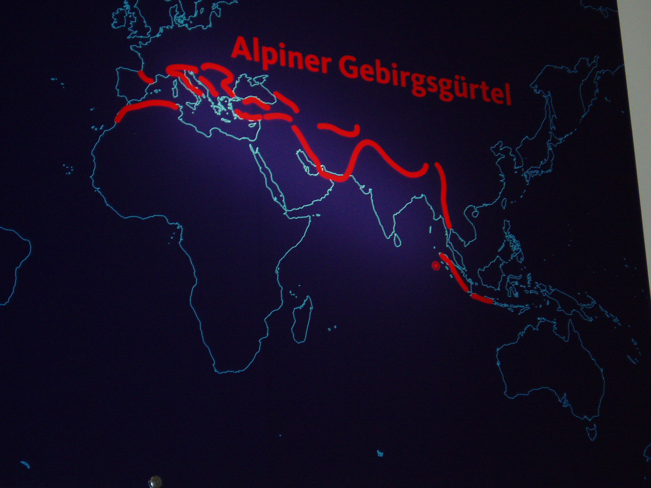 Foto des alpinischen Gebirgsgürtels aus der Ausstellung des NÖ-Landesmuseums: "Meeresstrand am Alpenrand"